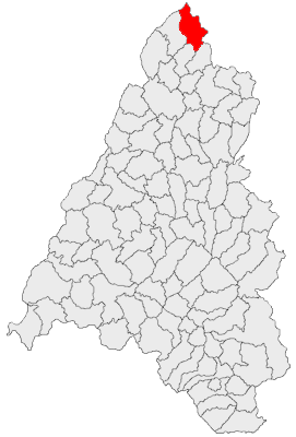 Categorie:Hărţi ale judeţului Bihor